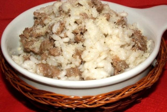 autore: alex pezzini fonte: ristorante antichi sapori descrizione: risotto alla pilota